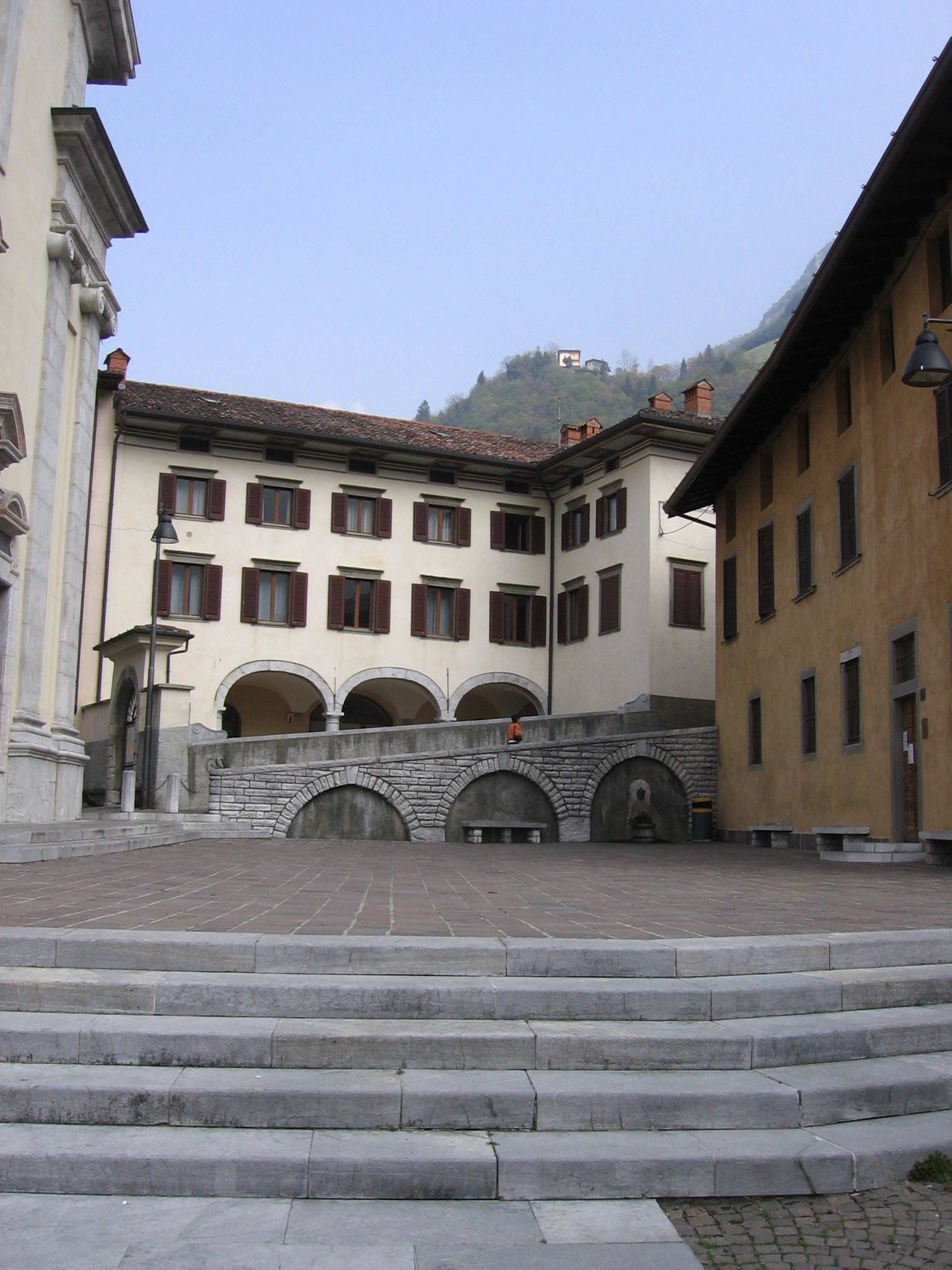 Centro di Ardesio, Bergamo, Italia